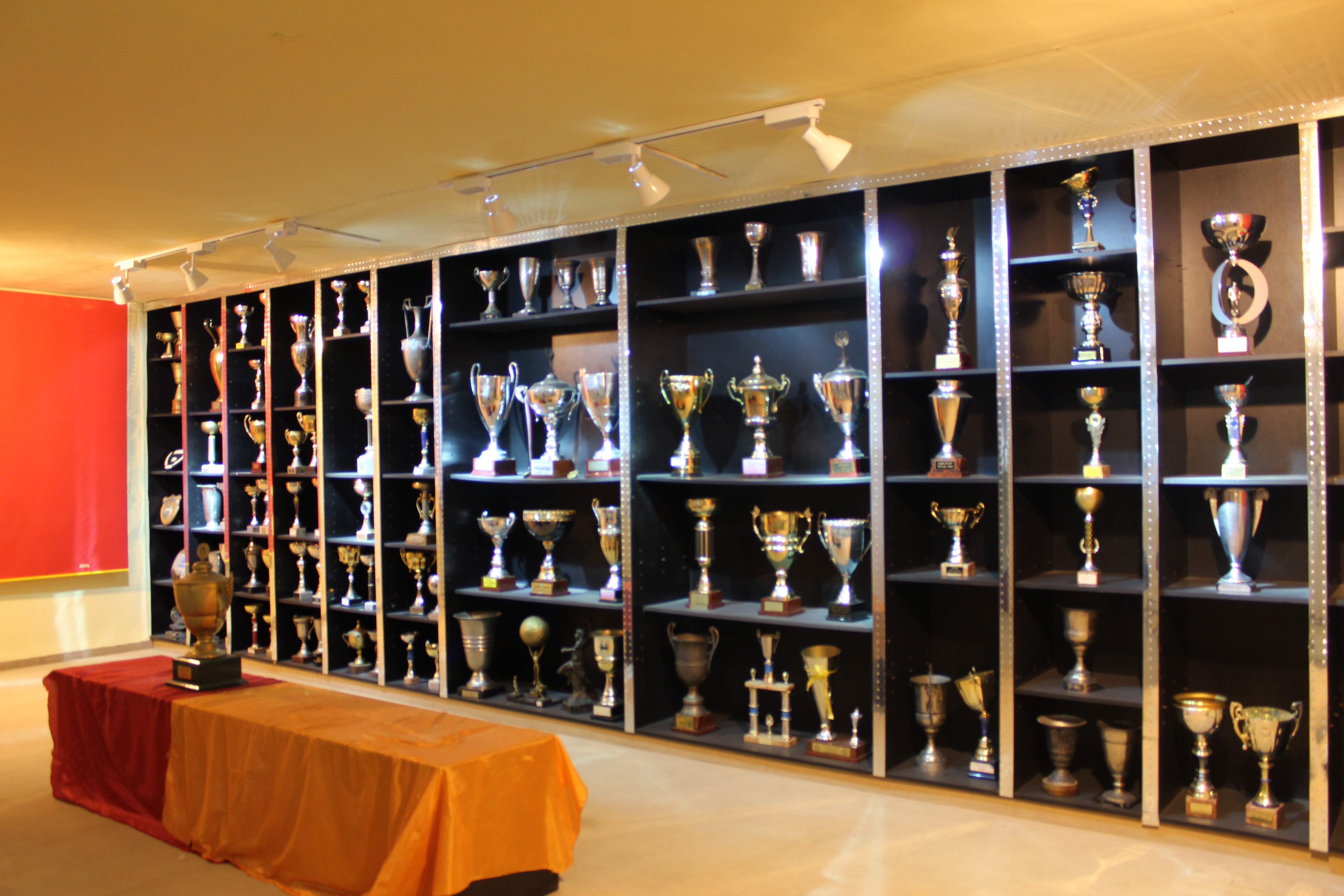 Bab Souika ,Tunis باب سويقة ، تونس